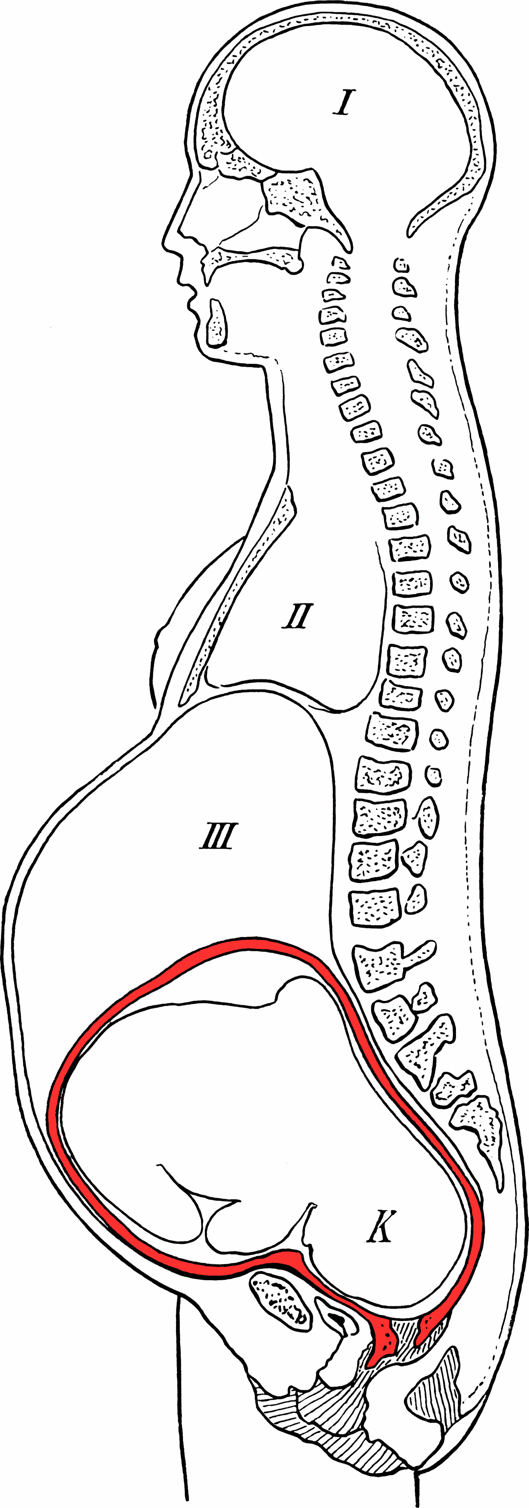 Die Körperpflege der Frau, Dr. C. H. Stratz 1907